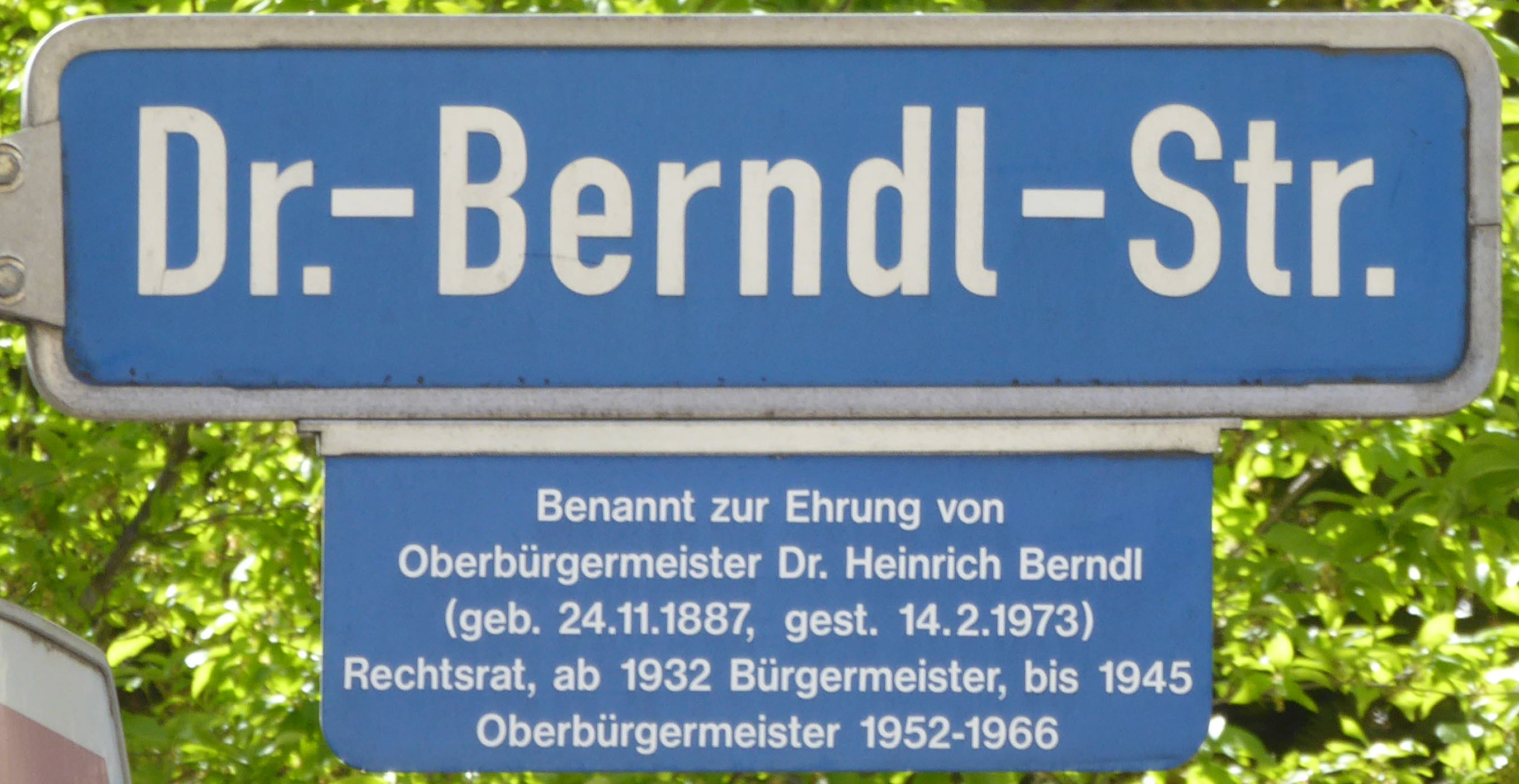 Straßenschild Dr.-Berndl-Straße (Ecke Buxacher Straße) in Memmingen